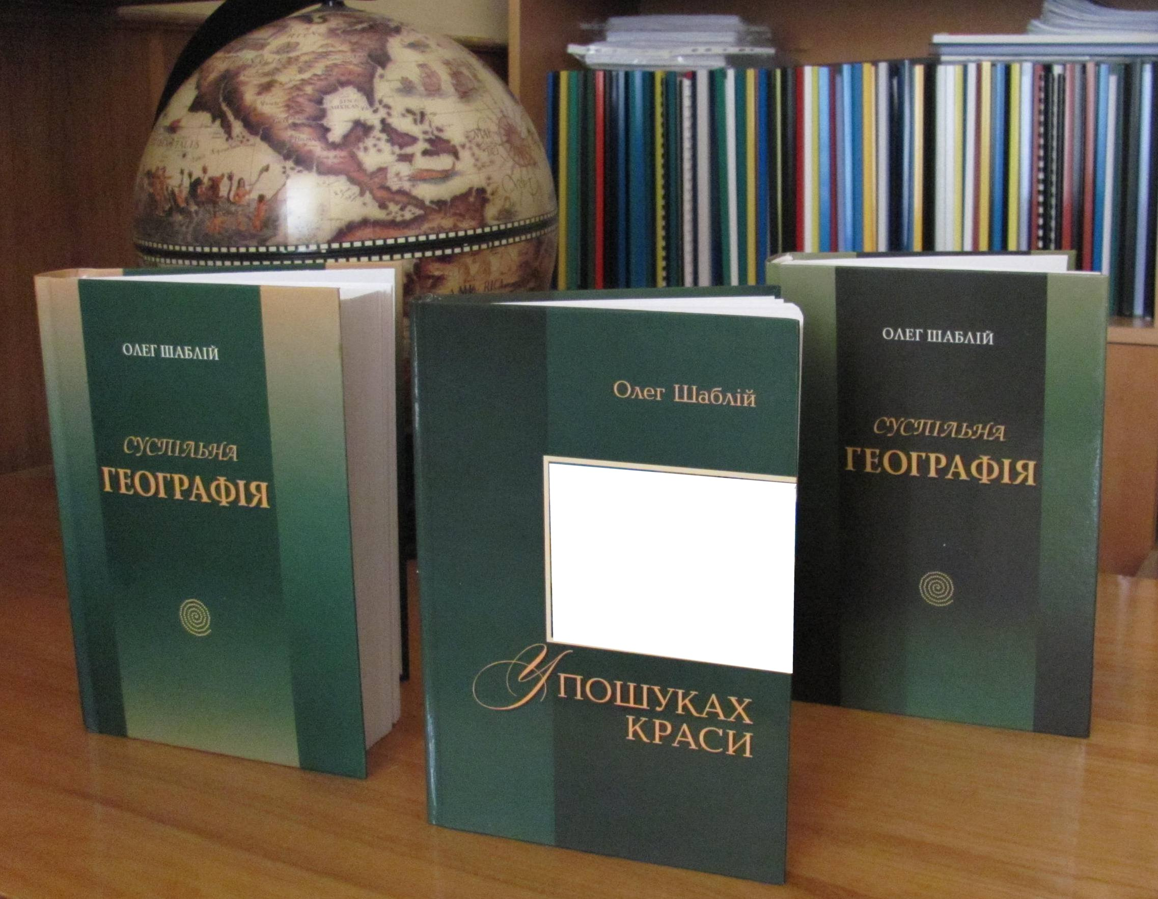 На фото зображені три наукові праці професора Шаблія Олега Івановича: дві книги "Суспільної географії" та праця про мистецький доробок автора та його захоплення - "У пошуках краси, тривоги і розради".